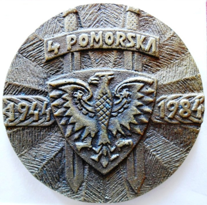 Medal pamiątkowy 4 PDPiech.